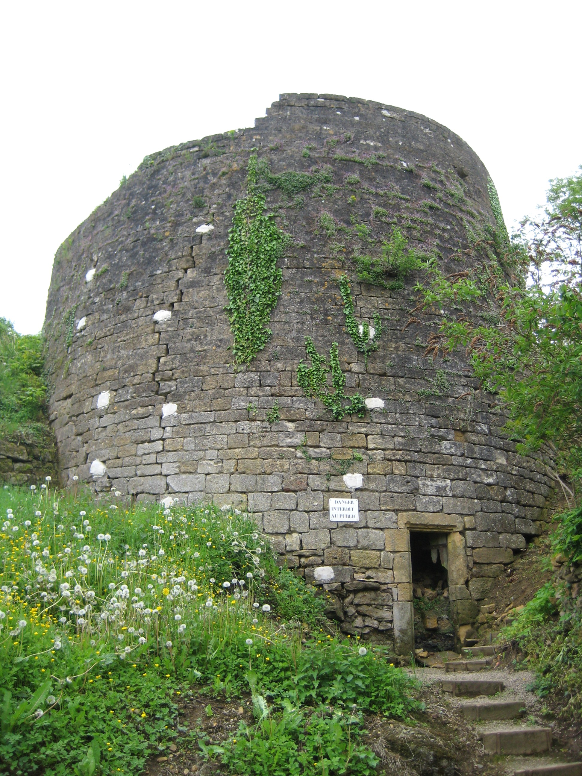 Description Tour de MalcouvertDate 16 May 2009Source mon appareil photoAuthor Aimelaime Tour de Malcouvert